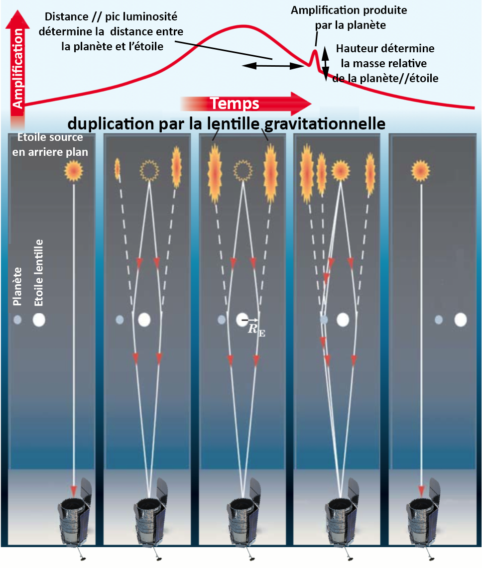 Principe de détection d'une planète par la méthode de la micro-lentille gravitationnelle